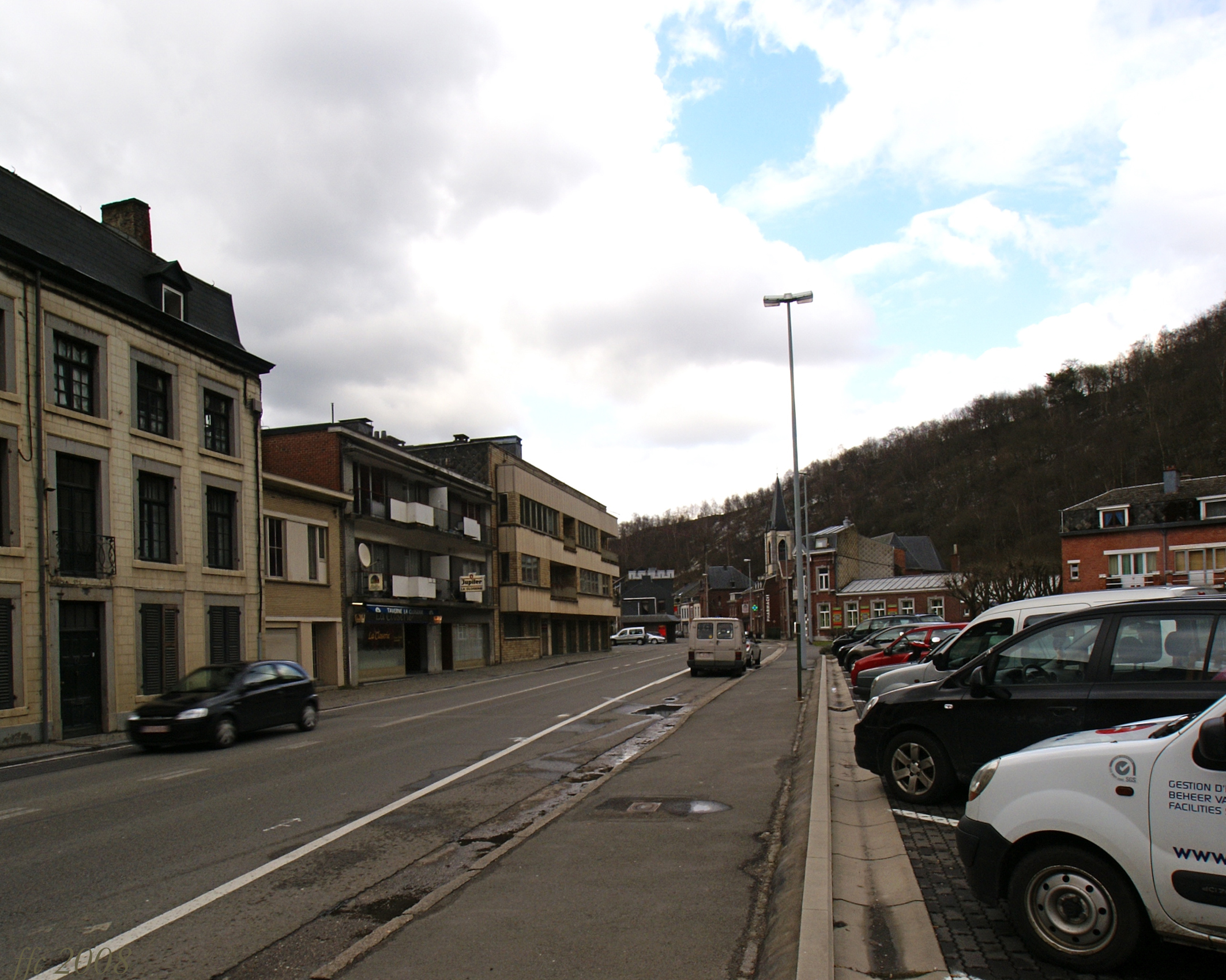 Chaudfontaine (Belgium) Avenue des Thermes High Street rue principale carrer major hoofdstraat